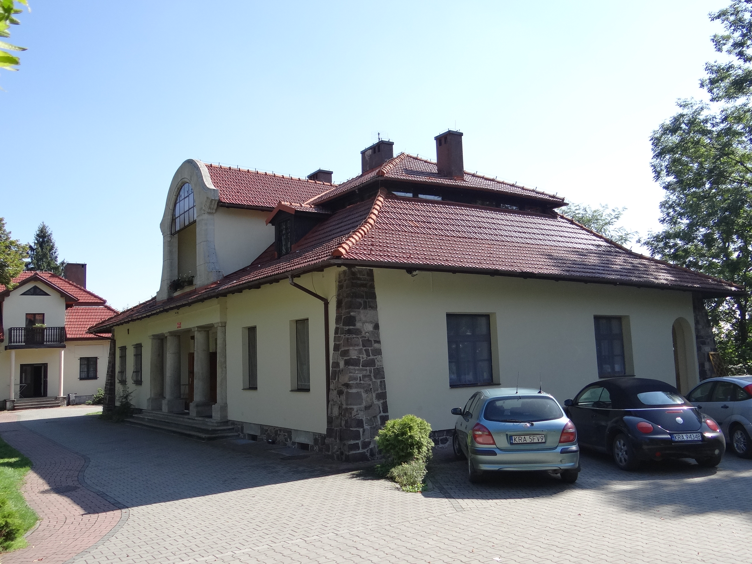 Miękinia, zespół willi